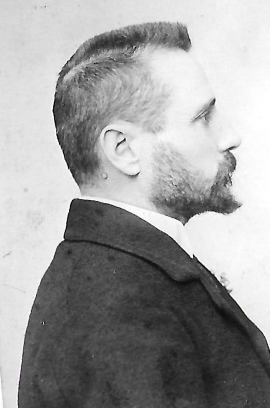 Retrato de perfil del pintor Reynaldo Giudici.